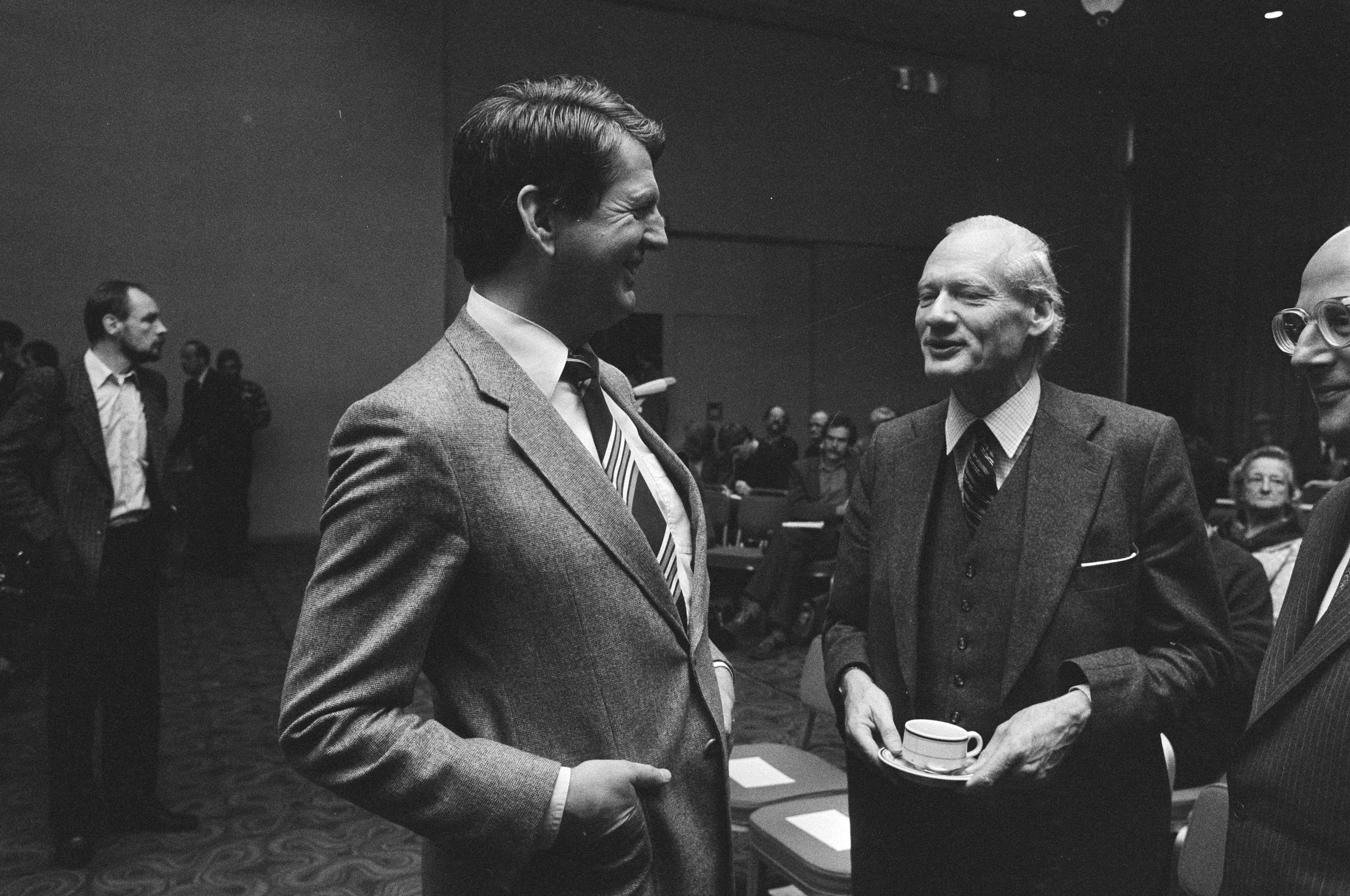 Collectie / Archief : Fotocollectie Anefo Reportage / Serie : Aandeelhoudersvergadering van de OGEM in het Hiltonhotel in Rotterdam Beschrijving : Drs. Lakeman (l), directeur van de Stichting Onderzoek Bedrijfs Informatie (SOBI) in discussie met prof. dr. W. J. Slagter van de onderzoekscommissie Overzeese Gas- en Elektriciteitsmaatschappij N.V. (OGEM) Datum : 4 november 1982 Locatie : Rotterdam, Zuid-Holland Trefwoorden : aandeelhoudersvergaderingen, directeuren, discussies Persoonsnaam : Lakeman, P., Slagter, W.J. Fotograaf : Bogaerts, Rob / Anefo Auteursrechthebbende : Nationaal Archief Materiaalsoort : Negatief (zwart/wit) Nummer archiefinventaris : bekijk toegang 2.24.01.05 Bestanddeelnummer : 932-3883